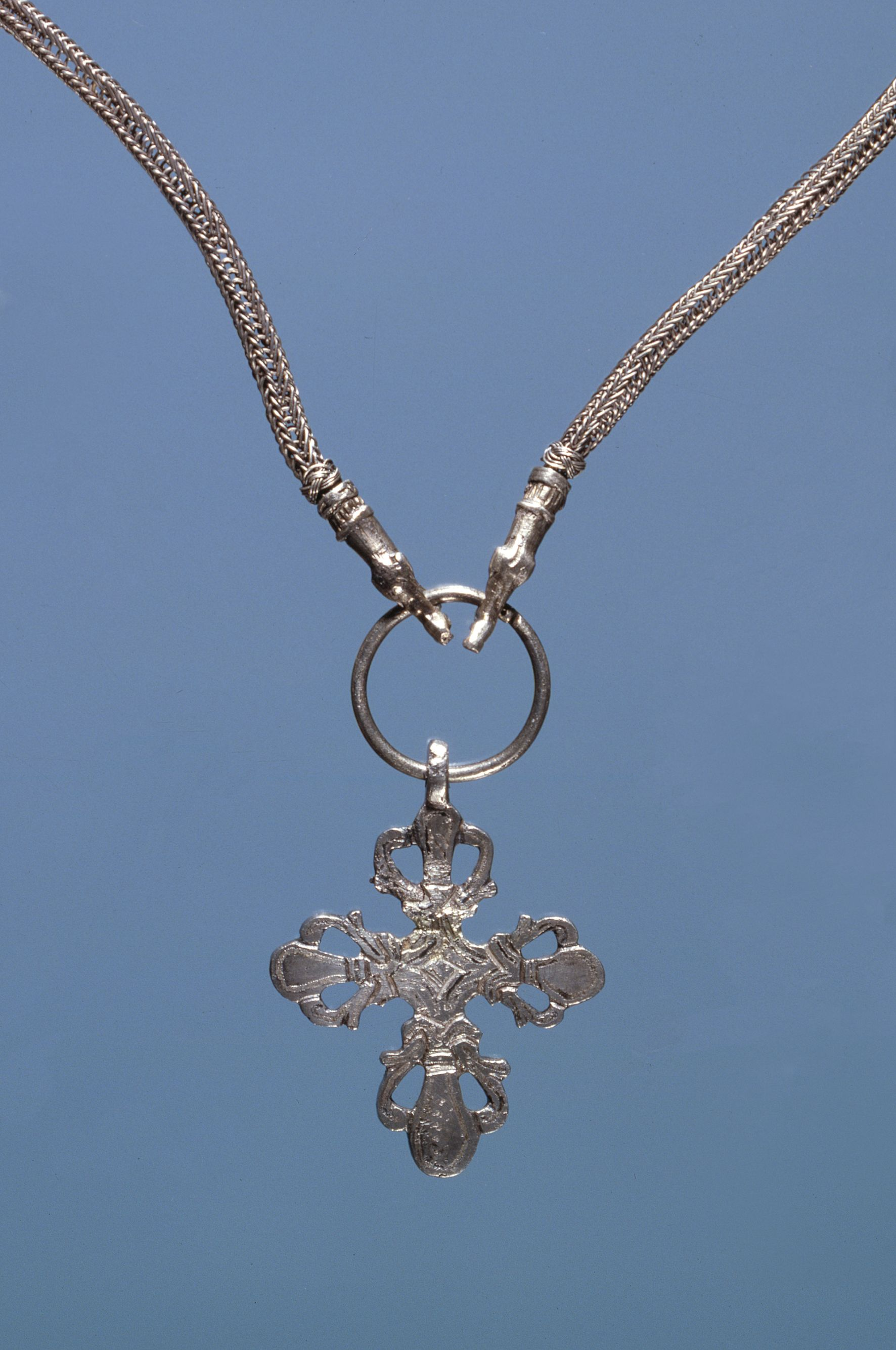 Bonderup-korset er et fladt hængekors i søvl med gennembrudte planteornamenter i den nordiske Ringerikestil fra o. 1050, ophængt i en kæde med dyrehoveder i Urnesstil. Korset blev fundet med to sølvringe som en skat, nedlagt o. 1060-79 ved Bonderup på Vestsjælland. Datering: o.1050 (fremstillingstidspunkt)